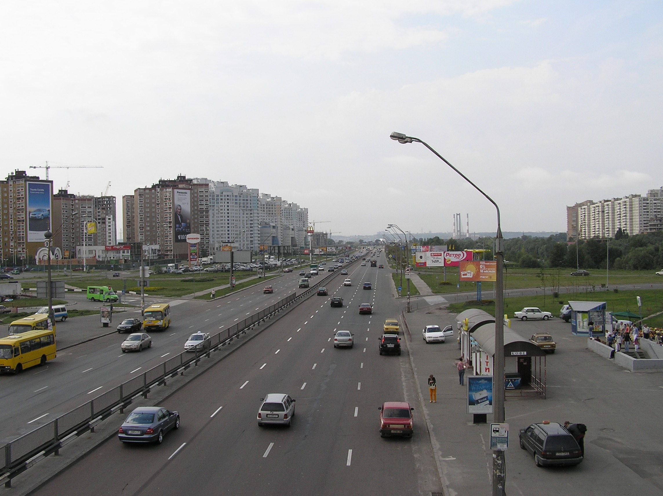 Kiew. Prospekt Bazhana. Ansicht nach West RichtungКиев, проспект Бажана. Вид в западном направлении